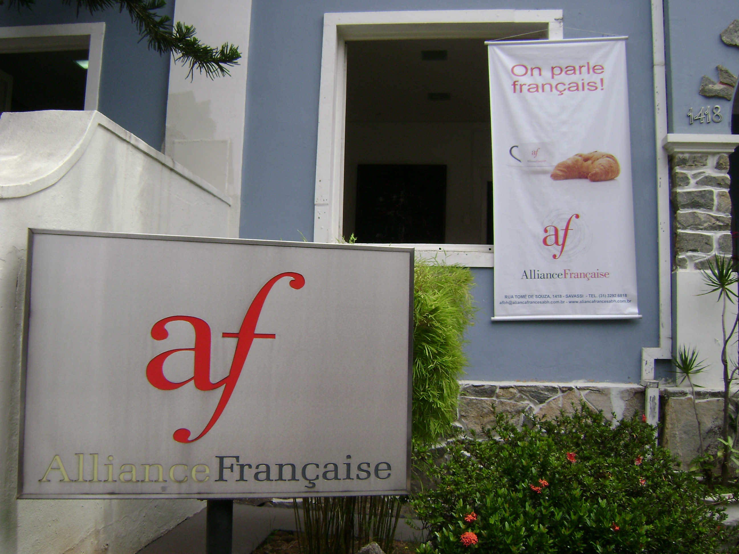 Entrada de filial da Aliança Francesa em Belo Horizonte, Brasil.